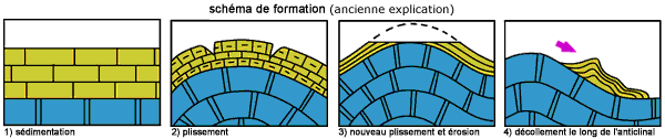 Ancienne explication de la formation du Chapeau de Gendarme (39310 - Septmoncel)